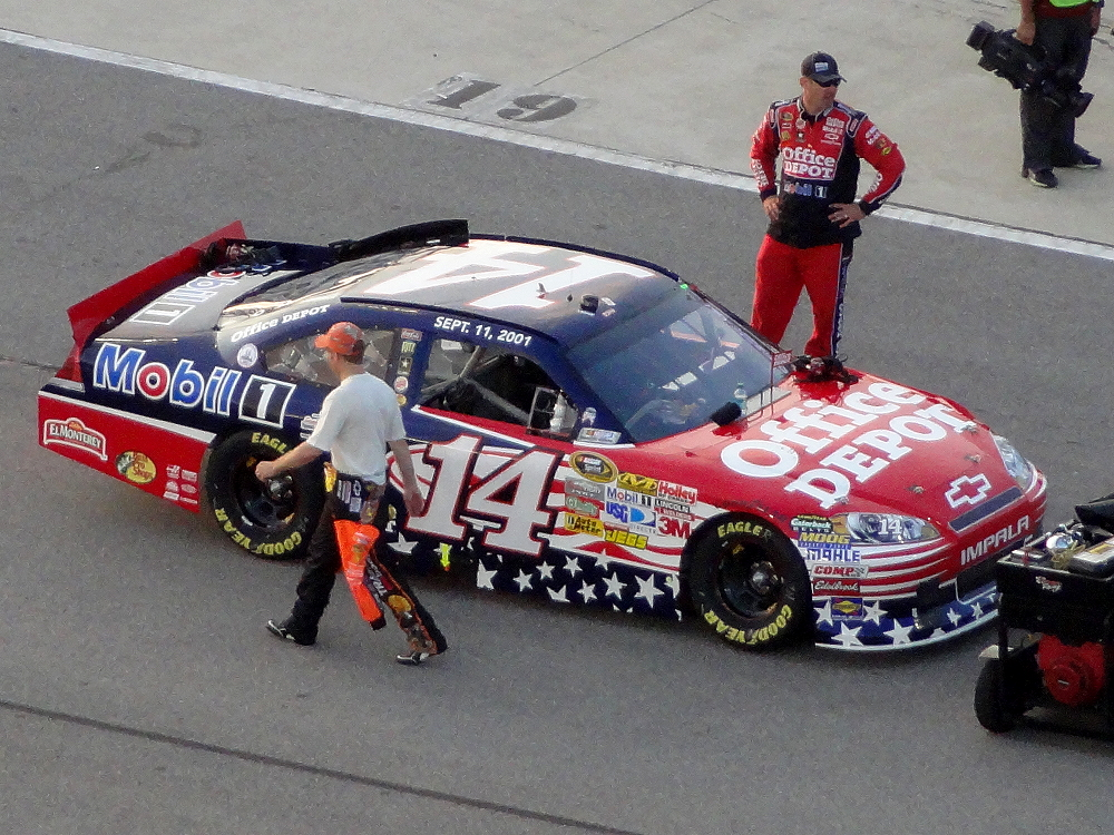 Aufnahme des #14-Chevrolets der NASCAR Sprint Cup Serie in Richmond am 11.9.2011. Fahrer: Tony Stewart.